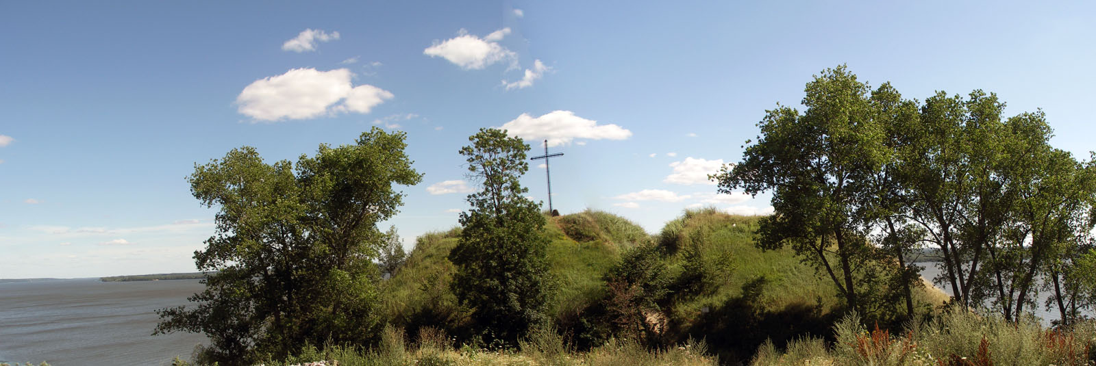 Dobrzyń an der Weichsel - Schlossberg - Überreste eines Schlosses aus dem 14. Jahrhundert, 1409 durch die Kreuzritter zerstört